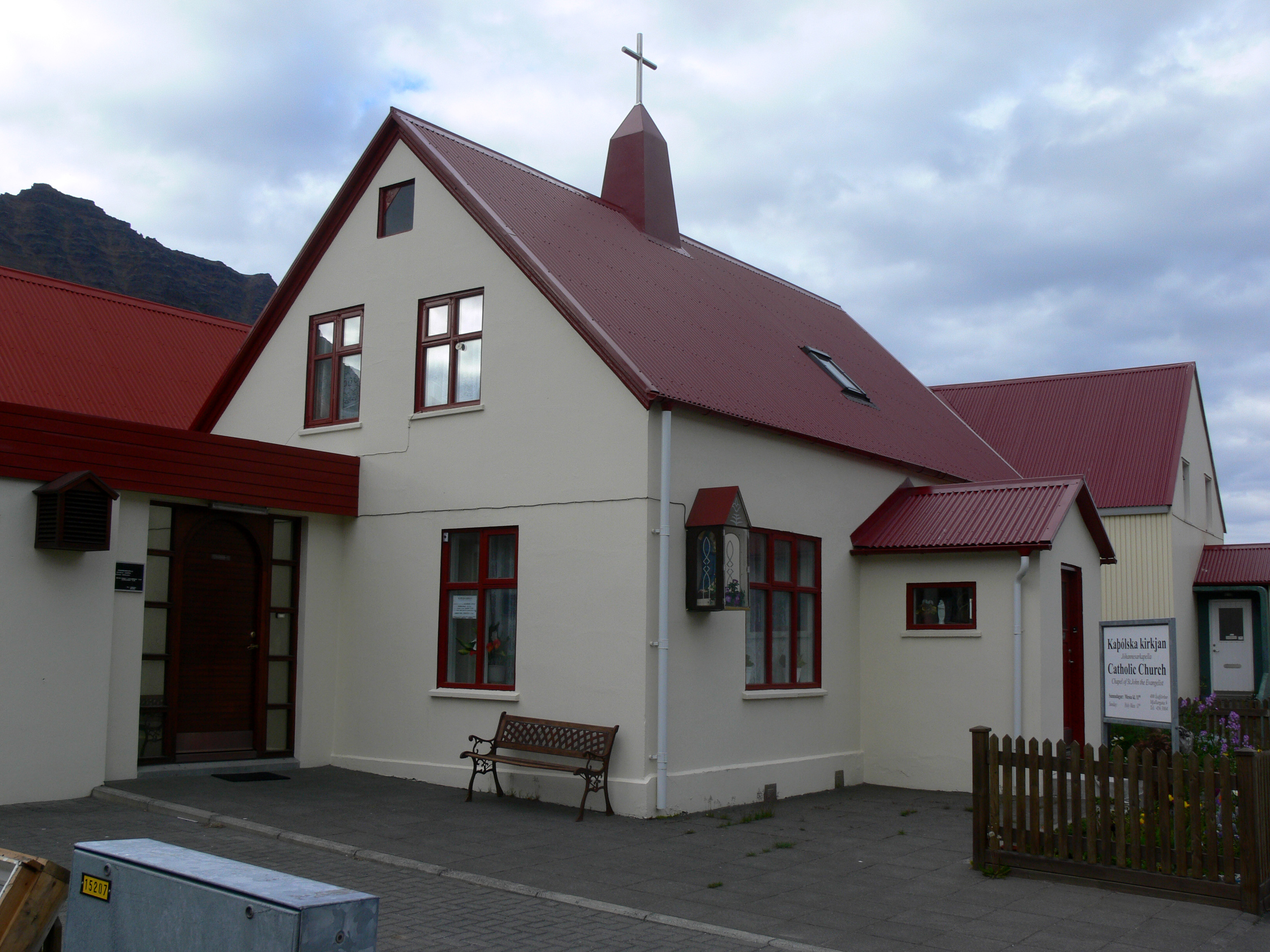 Katholische Kirche in Ísafjörður